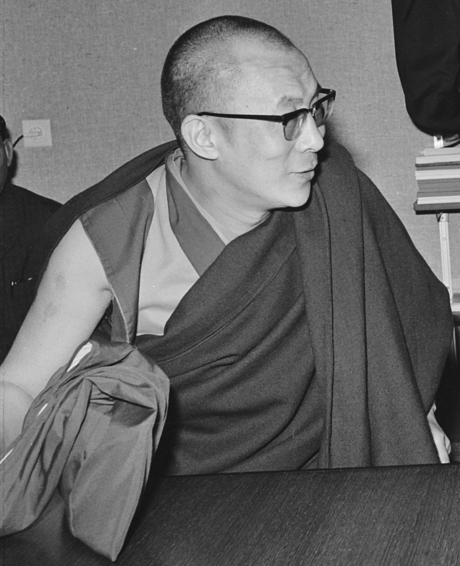 Collectie / Archief : Fotocollectie Anefo Reportage / Serie : [ onbekend ] Beschrijving : Kardinaal Alfrink ontvangt Dalai Lama Datum : 8 oktober 1973 Trefwoorden : kardinalen, ontvangsten Persoonsnaam : Alfrink, Bernardus, Dalai Lama Fotograaf : Mieremet, Rob / Anefo Auteursrechthebbende : Nationaal Archief Materiaalsoort : Negatief (zwart/wit) Nummer archiefinventaris : bekijk toegang 2.24.01.03 Bestanddeelnummer : 926-7357